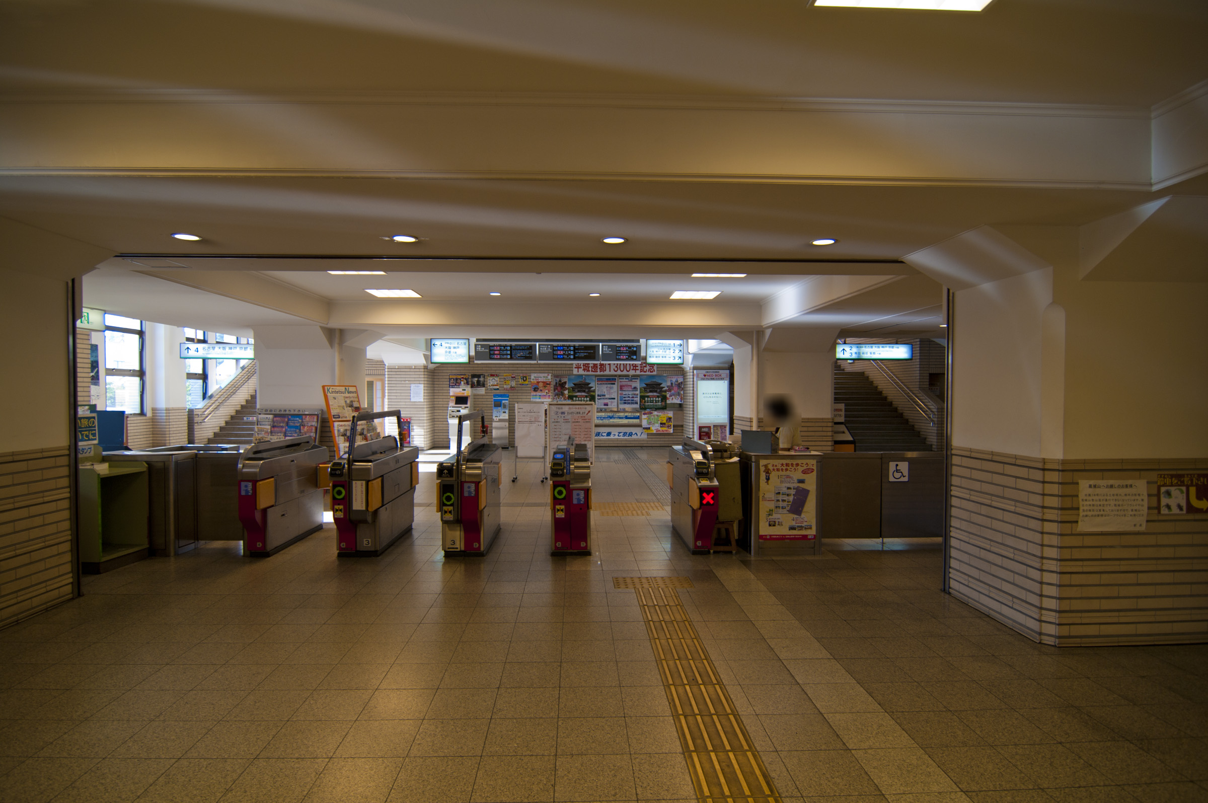 近畿日本鉄道山田線・鳥羽線 宇治山田駅構内